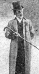 Leopoldo Fregoli disfrazado como uno de sus personajes hacia 1935 en la revista Caras y Caretas.